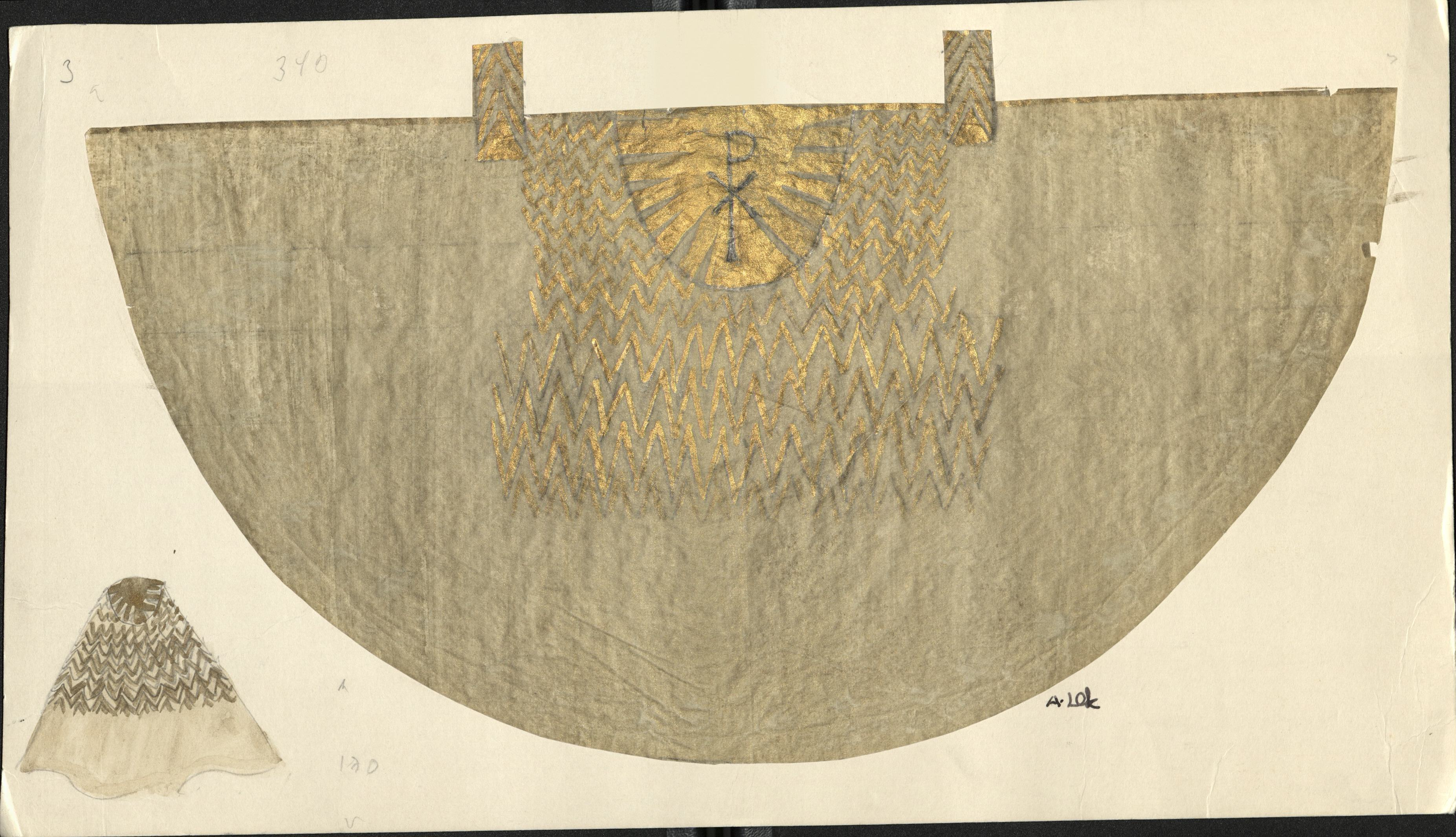 Korkåpa för Falu Kristine komponerad avAnna-Lisa Odelqvist-Kruse 1978